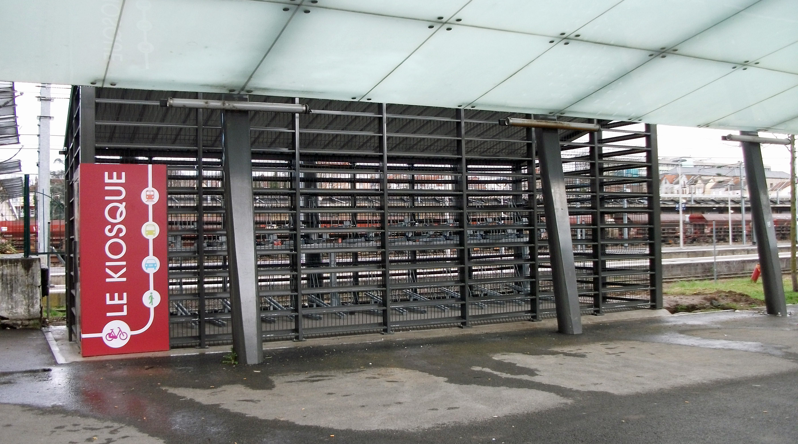 Parking vélos sécurisé au sud du bâtiment voyageurs de la gare de Vichy le 21 février 2014, créé à la suite du déménagement du kiosque MobiVie et de l'intention de la communauté d'agglomération de Vichy Val d'Allier de créer un service de location de vélos et de centraliser le point intermodalité dans le BV de la gare SNCF de Vichy d'intérêt national. Sa capacité est de 40 places. Les vélos (location en principe) peuvent être garés sur deux niveaux, 7 jours sur 7 et 24 heures sur 24. Un badge est nécessaire pour stationner son vélo.